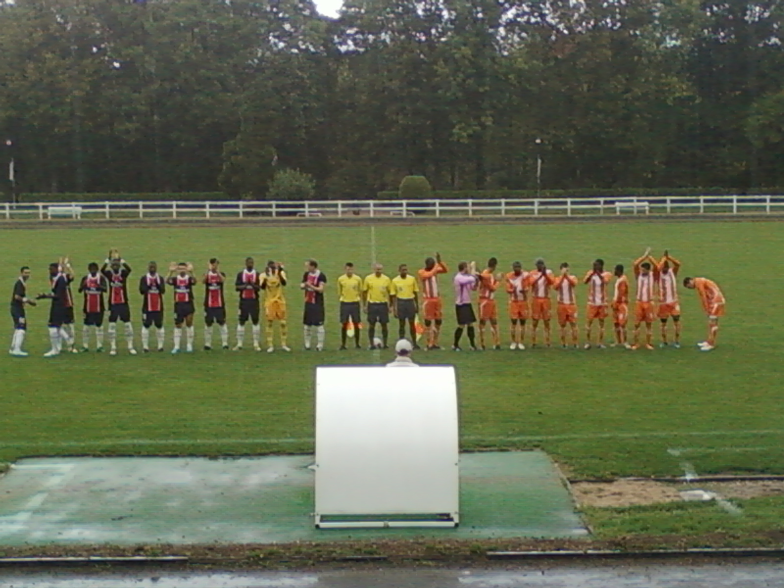 Présentation des équipes lors du match AC Boulogne-Billancourt - Paris SG C (0-2) du 11 septembre 2011 au stade Marcel Bec de Meudon